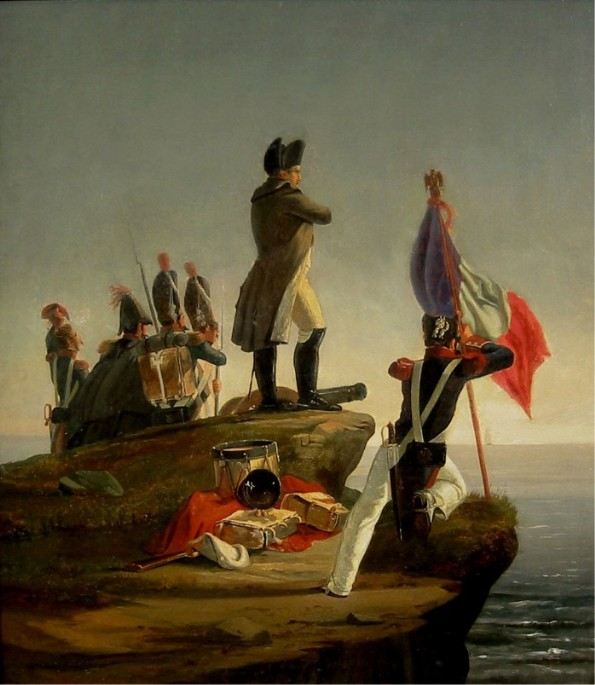 Dieses Gemälde 56x50 "Napoleon Bonaparte" auf Elba erwartet die Ankunft der L´Inconstant und wurde von Horace Vernet gefertigt. Im Jahre 1814 musste Napoleon Bonaparte abdanken und ihm wurde die Insel Elba als souveränes Fürstentum übertragen wo er auch am 4.04.1814 mit seinen treuen Gefolgsleuten landete. Dieses Gemälde zeigt Napoleon am Abend wie er die Ankunft der L´Inconstant erwartet, diese ist auch schon in der Ferne zu sehen. Am 26.02.1815 schiffte Napoleon sich mit seinen Gefolgsleuten auf die L´Inconstant und anderen kleineren Schiffen ein und sie verließen Elba.